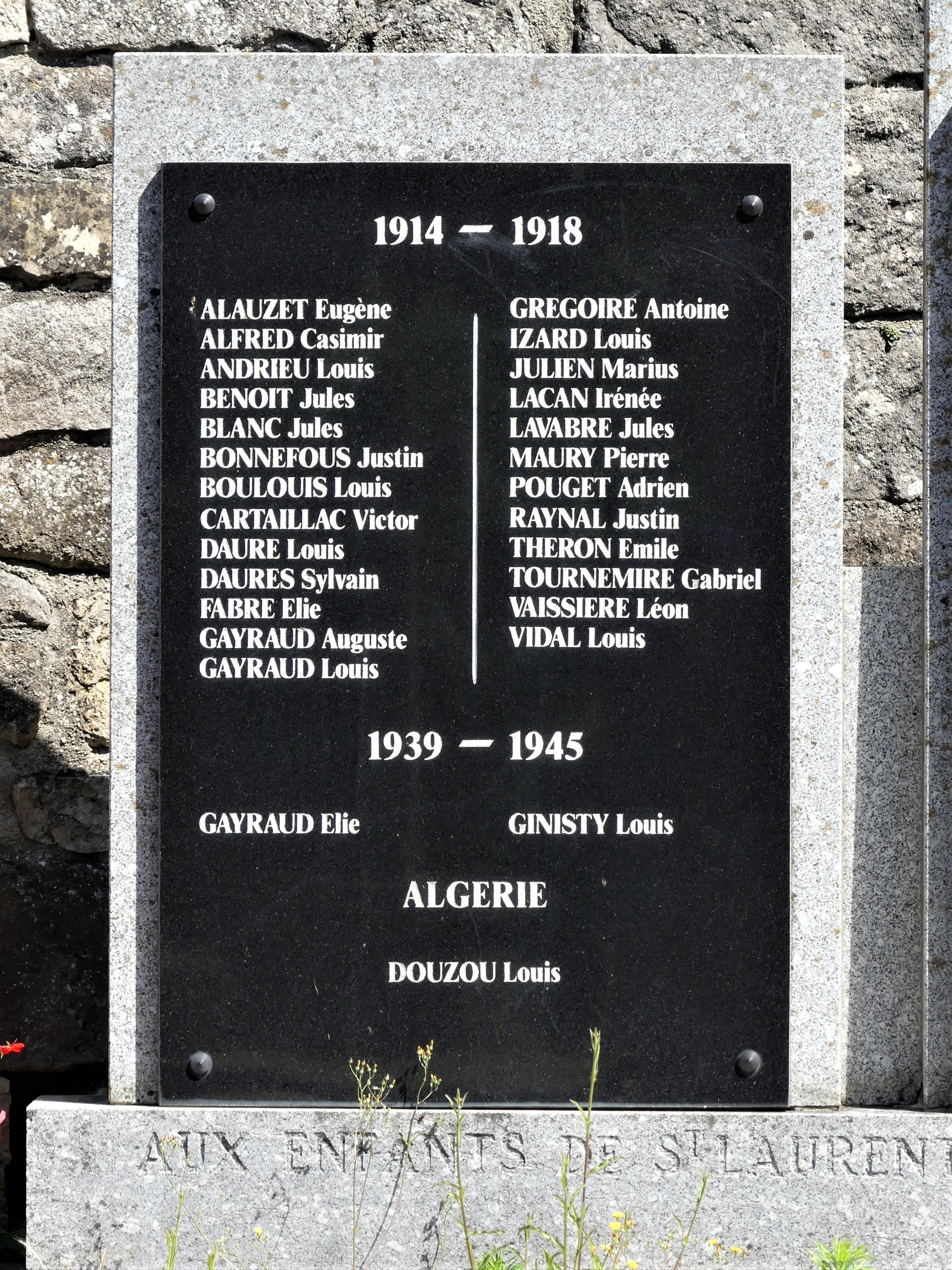 La plaque du monument aux morts, Saint-Laurent-de-Lévézou, Aveyron, France.